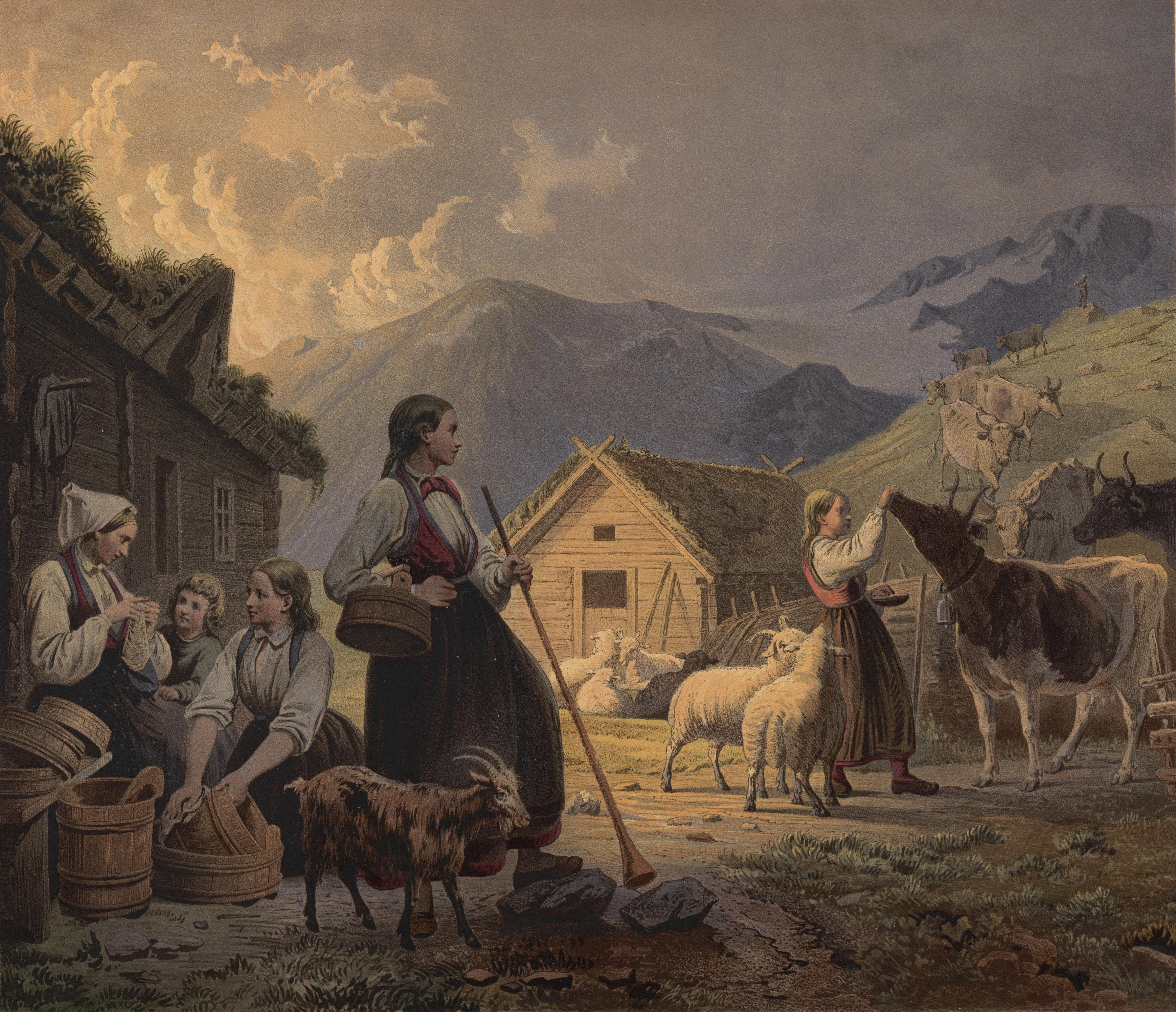 Illustrasjon hentet fra boken Norske Folkelivsbilleder av Tidemand, Adolph og utgitt av Chr. Tønsberg (Christiania, 1858)